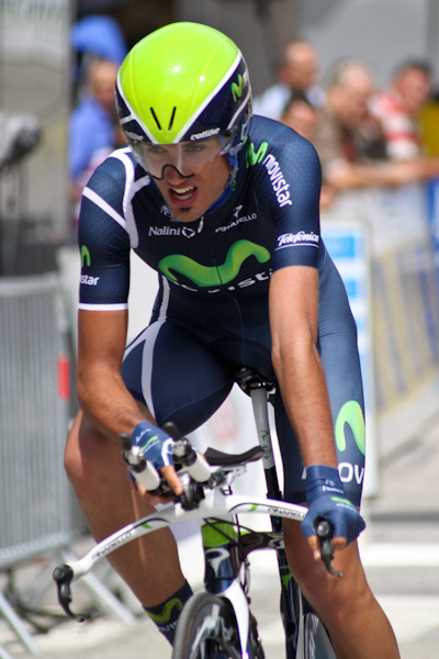 Prologue du Critérium du Dauphiné 2011, Saint Jean de Maurienne